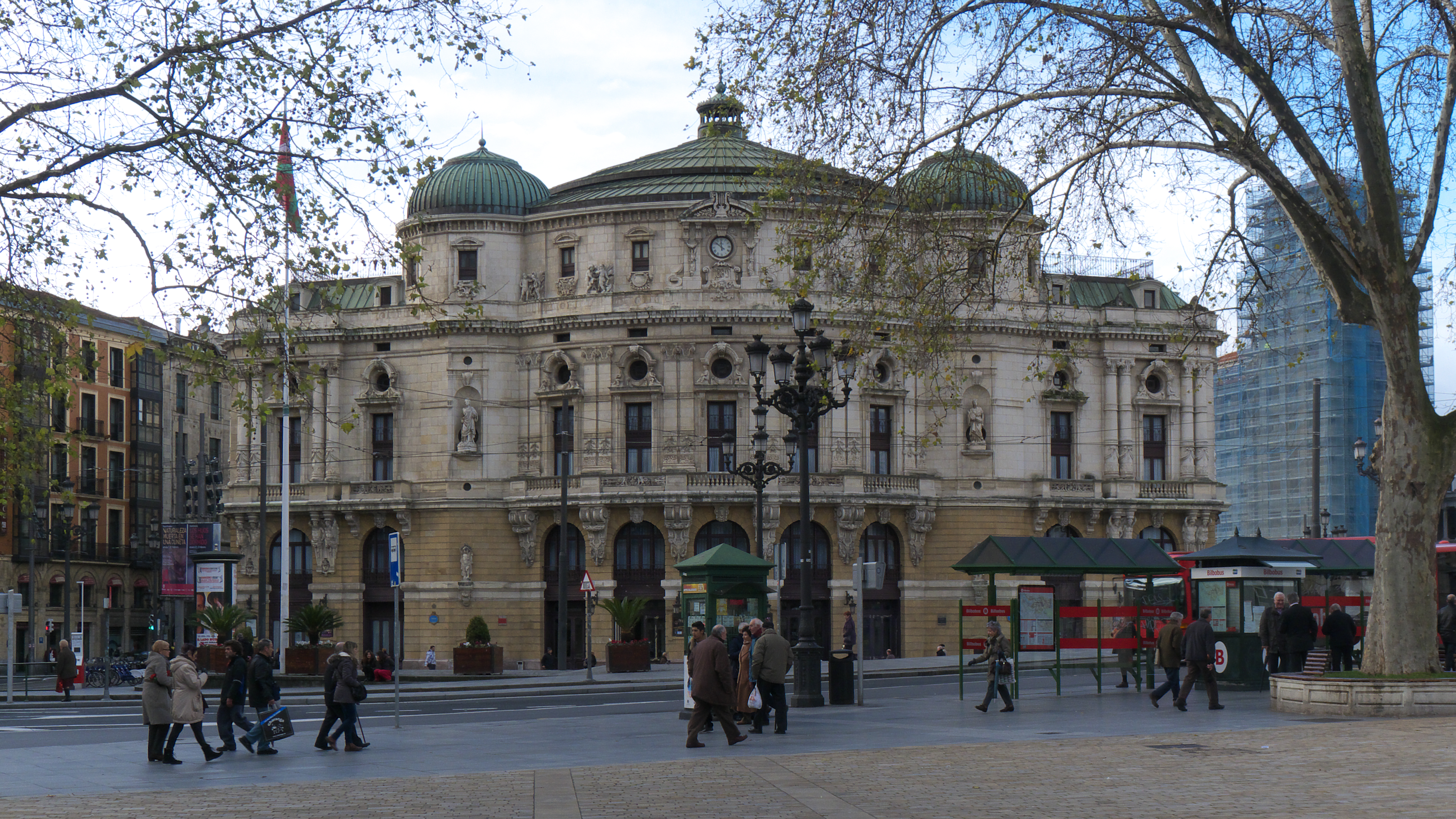 Joaquín Rucoba y Octavio de Toledo (1890)